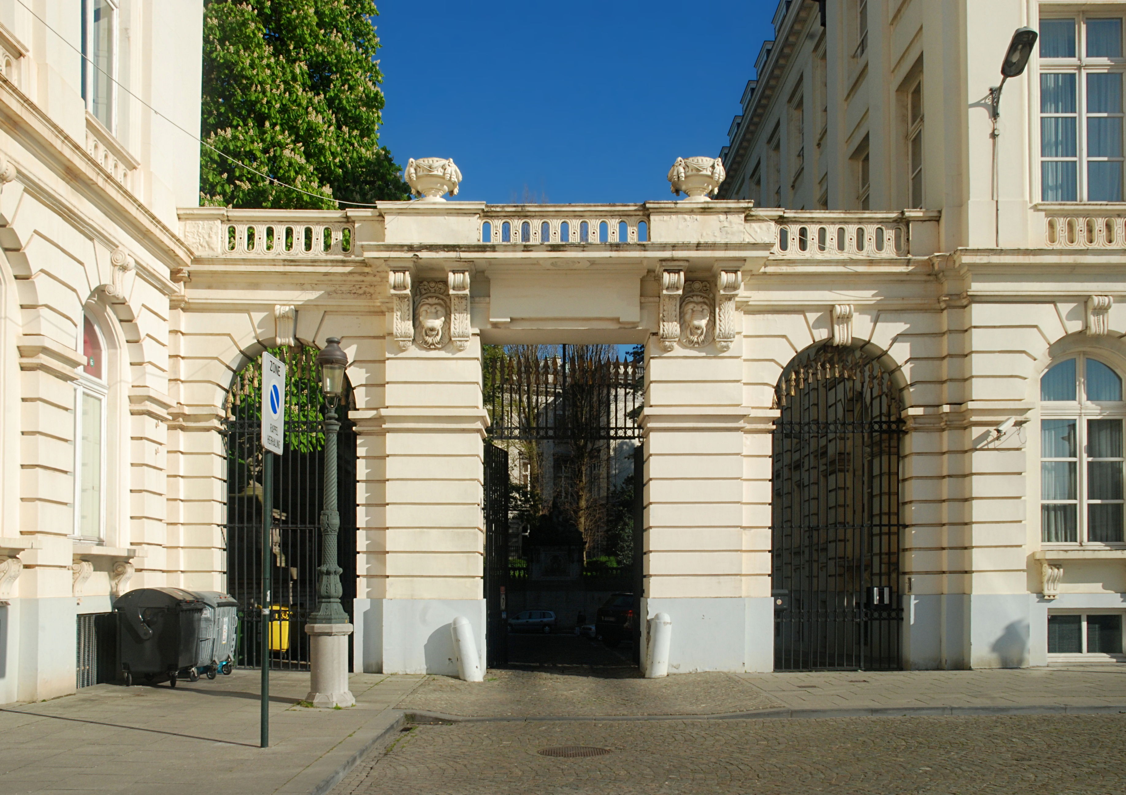 Belgique - Bruxelles - Place Royale - Portique du Borgendael